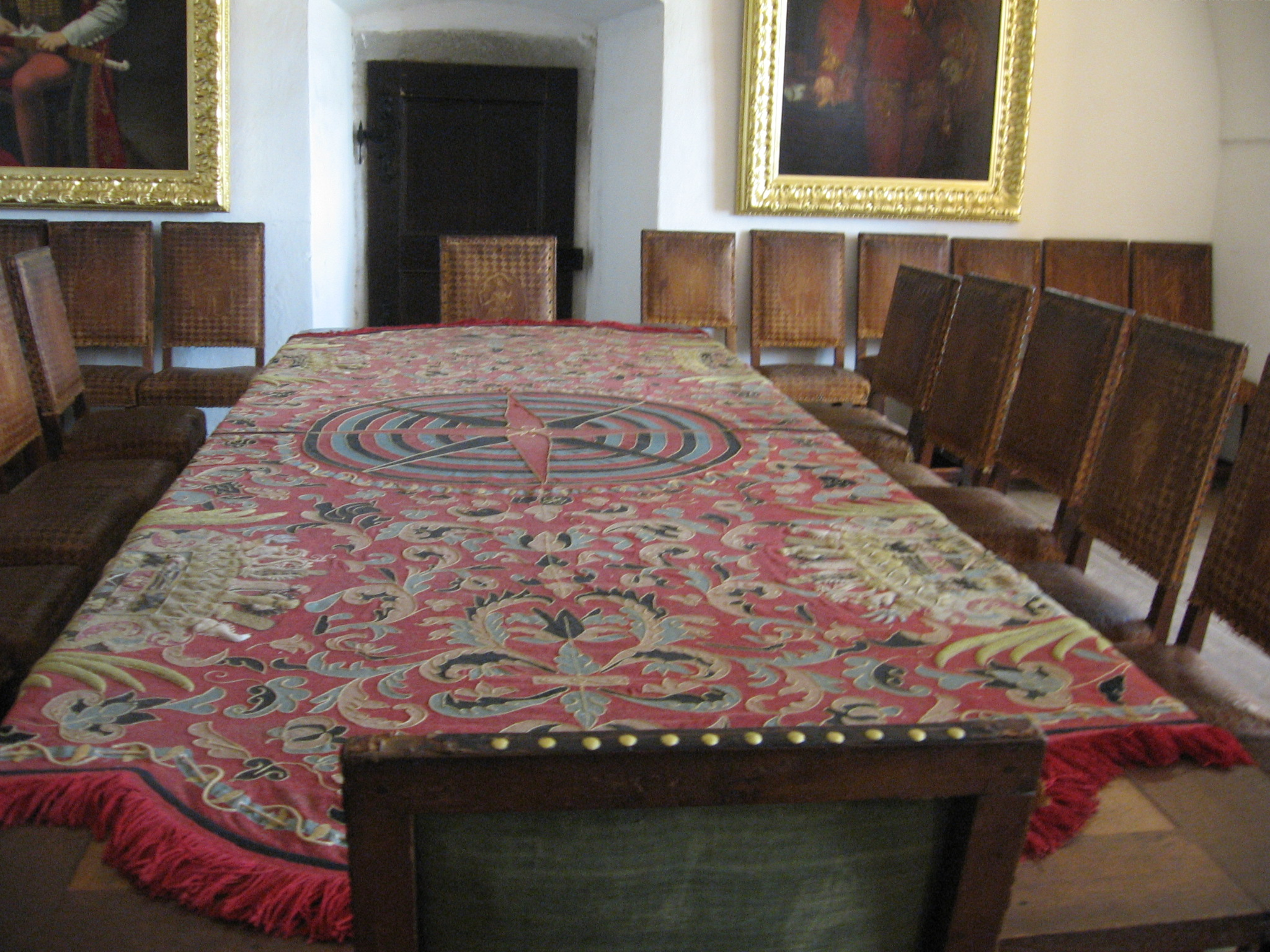 Česky: Interiér.